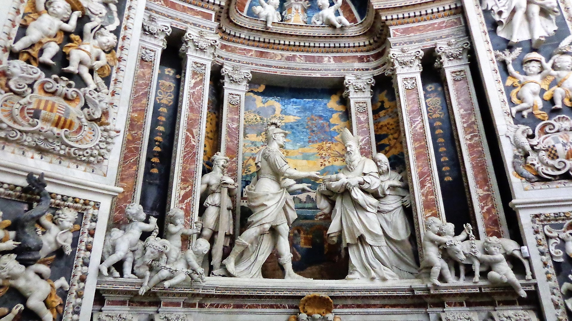 Interno chiesa, altorilievo Achimelech offre i pani sacri a Re Davide di Gioacchino Vitagliano